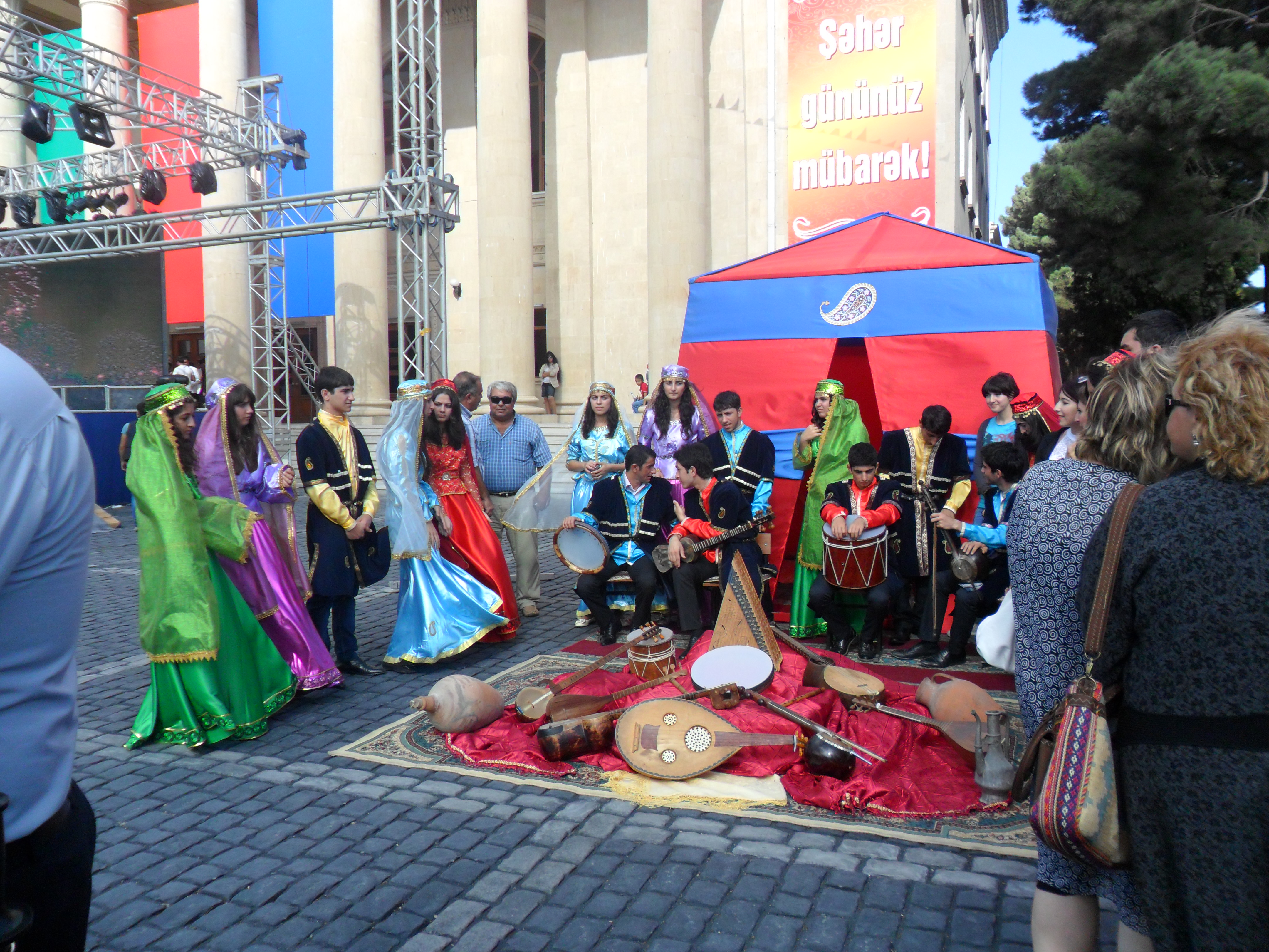 Sumqayıtda Şəhər Günü